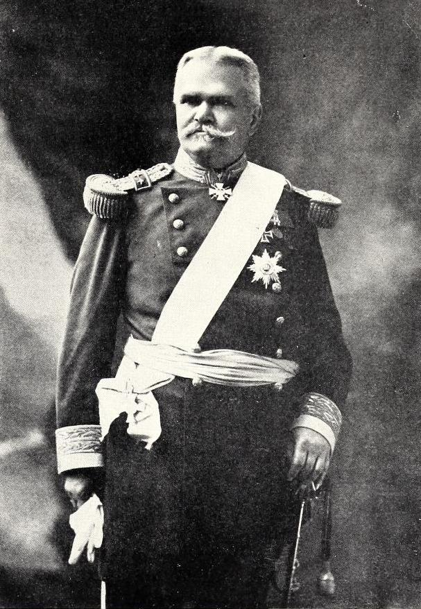 Emilio Körner (1815-1920)